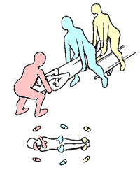 Relevage par la méthode du pont simple. L'illustration du haut montre une vue de trois-quart plongeante ; l'illustration du bas montre une vue de dessous avec la position des mains et des pieds. Auteur : Christophe Dang Ngoc Chan (Cdang), dessin original numérisé retouché avec un logiciel de dessin.